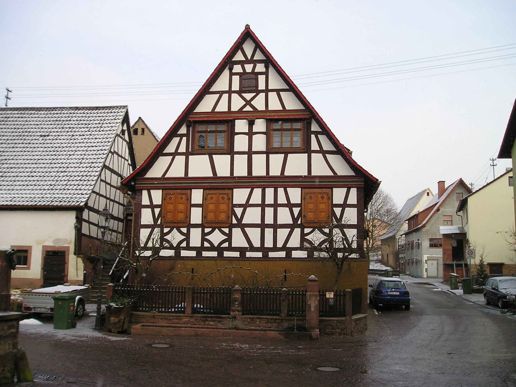 "Fachwerkhaus" in Epfenbach, Germany